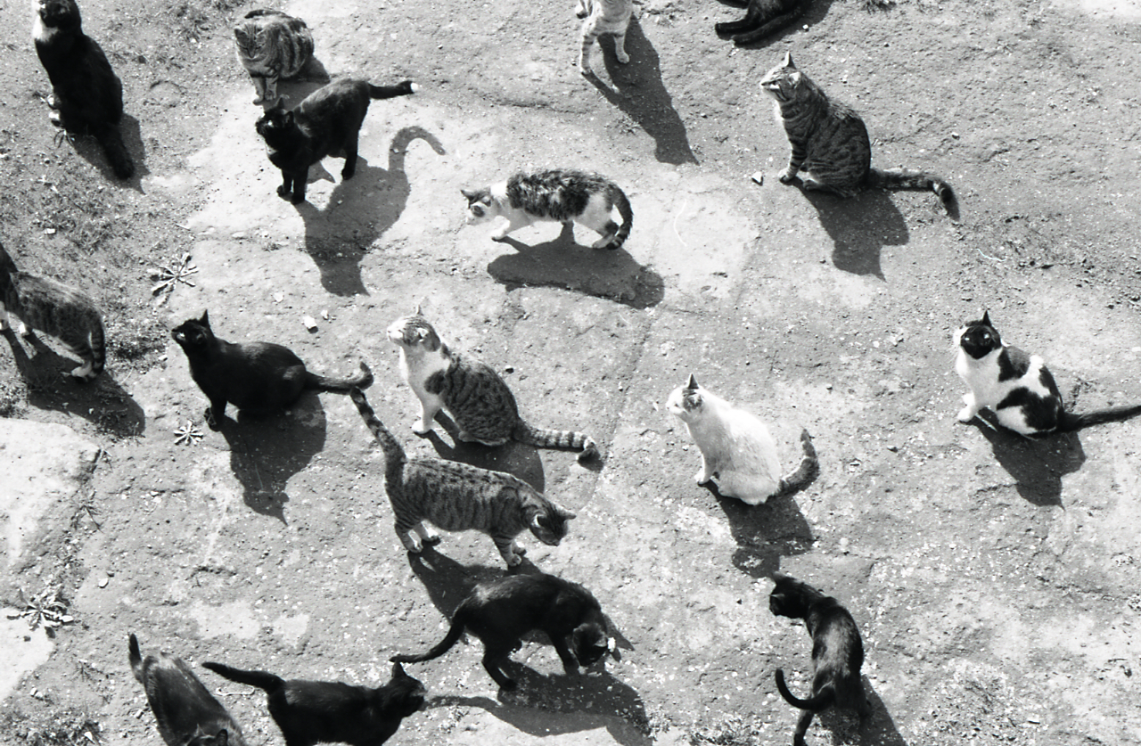 Servizio fotografico : Roma, 1969 / Paolo Monti. - Strisce: 7, Fotogrammi complessivi: 34 : Negativo b/n, gelatina bromuro d'argento/ pellicola ; 35 mm. - ((I fotogrammi hanno una doppia numerazione. . - Sul portanegativi: Nikon Agfa 21. - Sul dorso del portanegativi Monti specifica: Part. Pantheomn e Porcin della Minerva. Part. cortili e muri e fontane presso Piazza Minerva. Gatti di Largo Argentina""